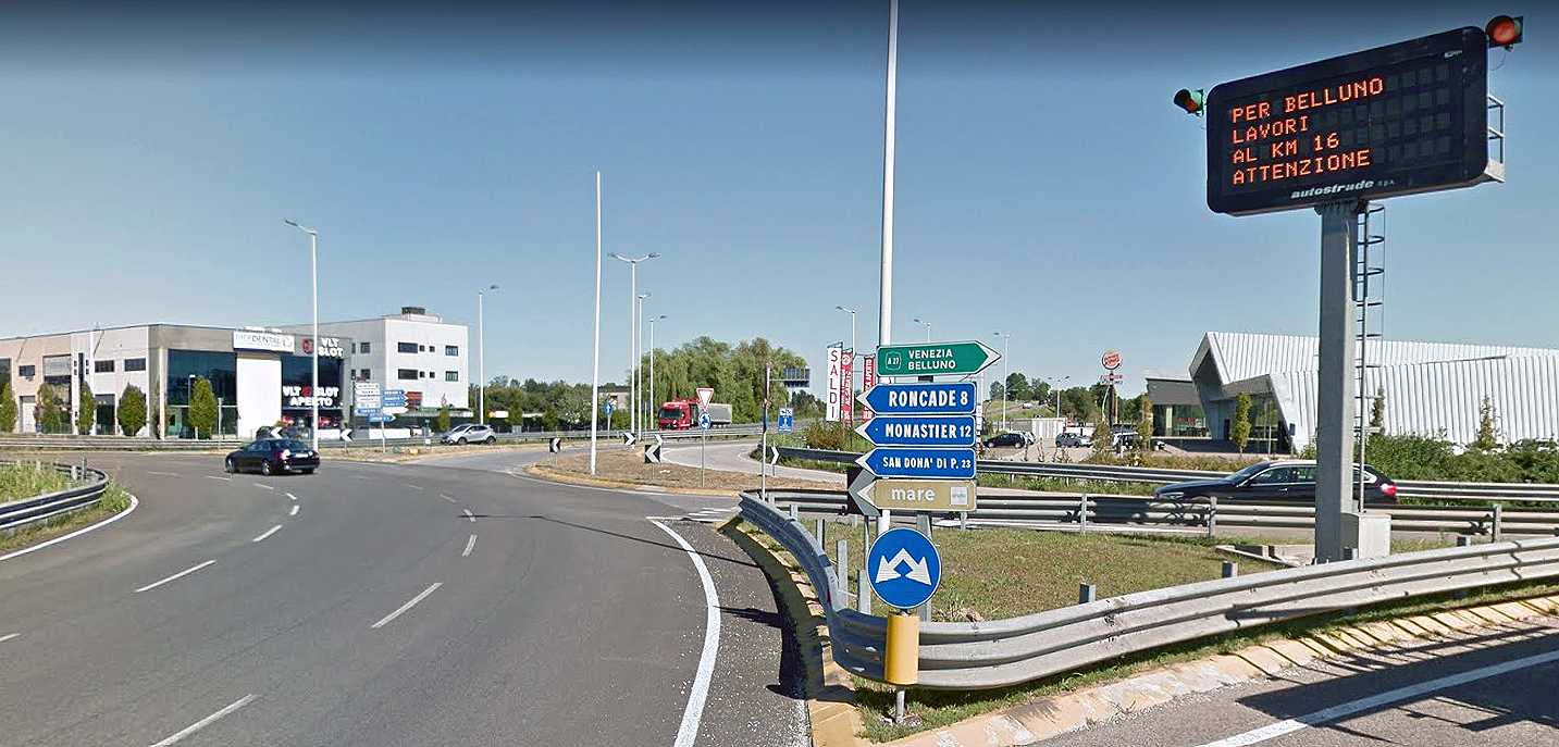 SR89 Treviso-mare presso il casello della a27